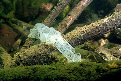 Kuitbaars